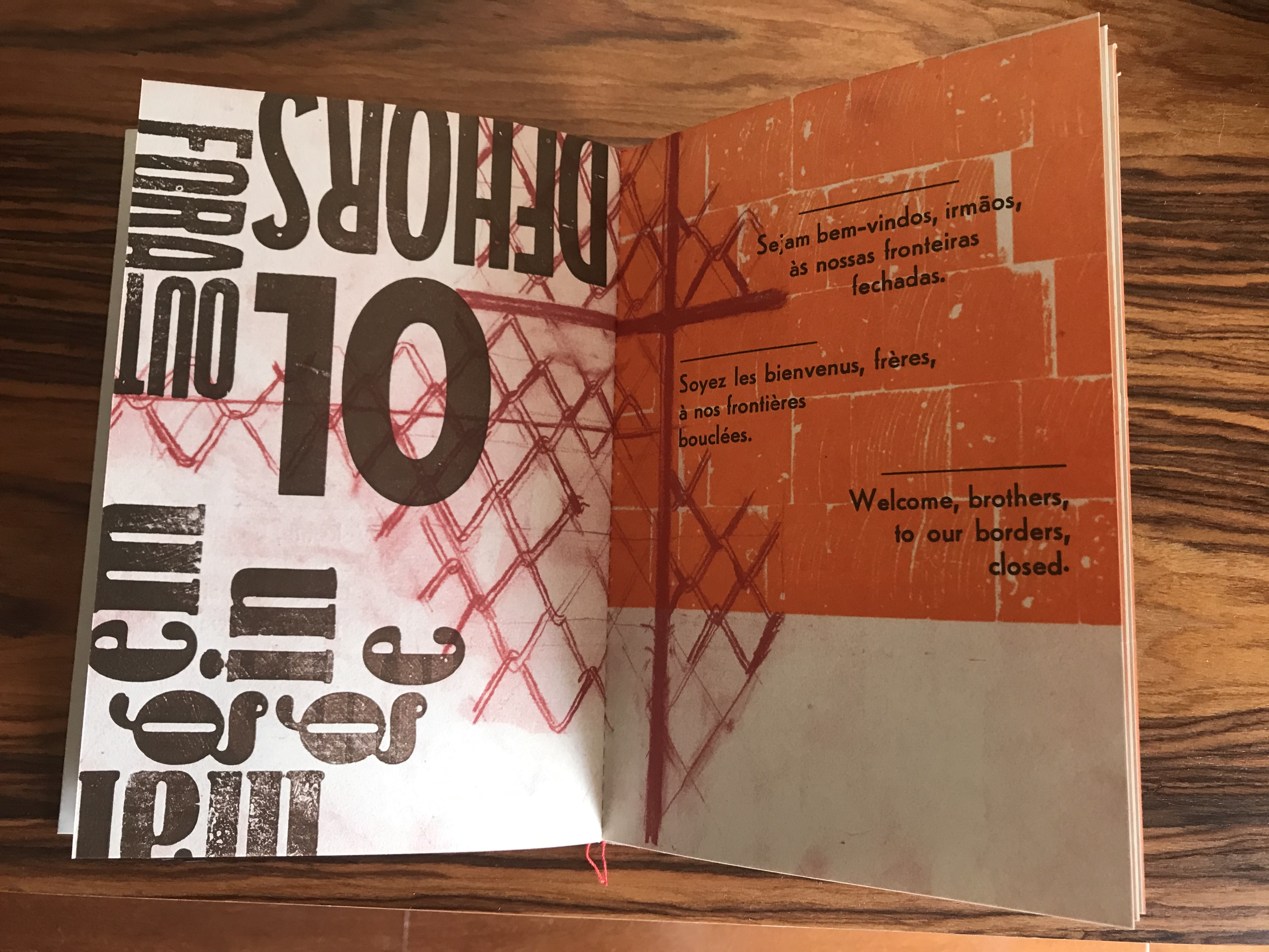 Clube Mediterrâneo – Doze Fotogramas e Uma Devoração são poemas breves sobre o drama da humanidade - homens e mulheres, nossos semelhantes que fogem da guerra, da destruição e da morte, arriscando a vida no ímpeto vital da fuga.